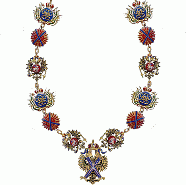 Российская Империя Императорский орден Святого апостола Андрея Первозванного Знак ордена на цепи